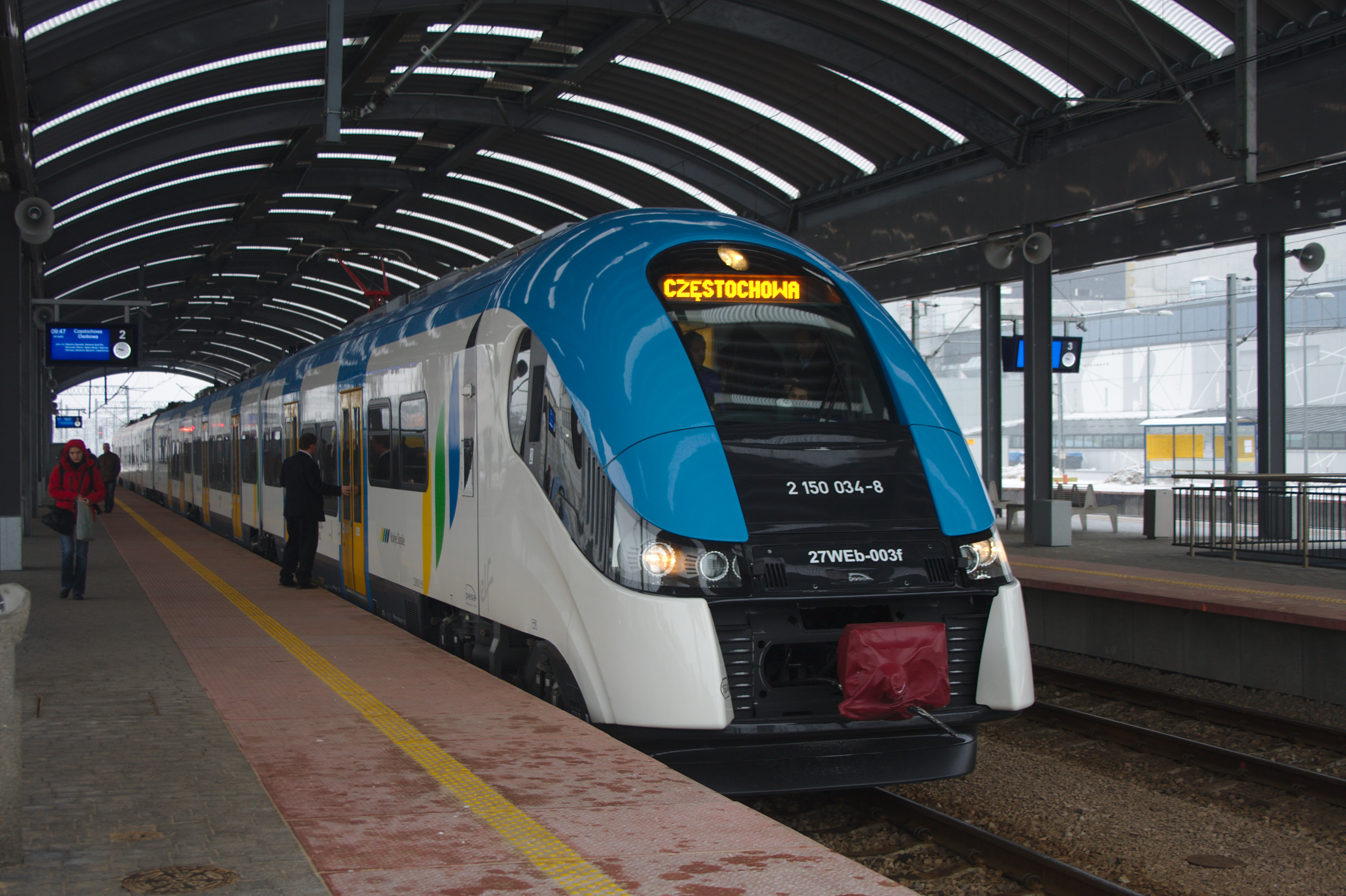 Elektryczny zespół trakcyjny Kolei Śląskich - 27WEb-003 - na stacji kolejowej Katowice, peron 3, odjedzie do Częstochowy